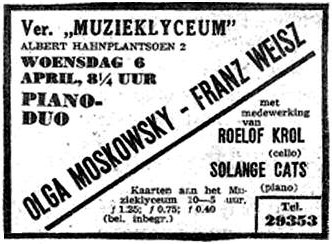 Franz Weisz Olga Moskowsky De Telegraaf April 1938